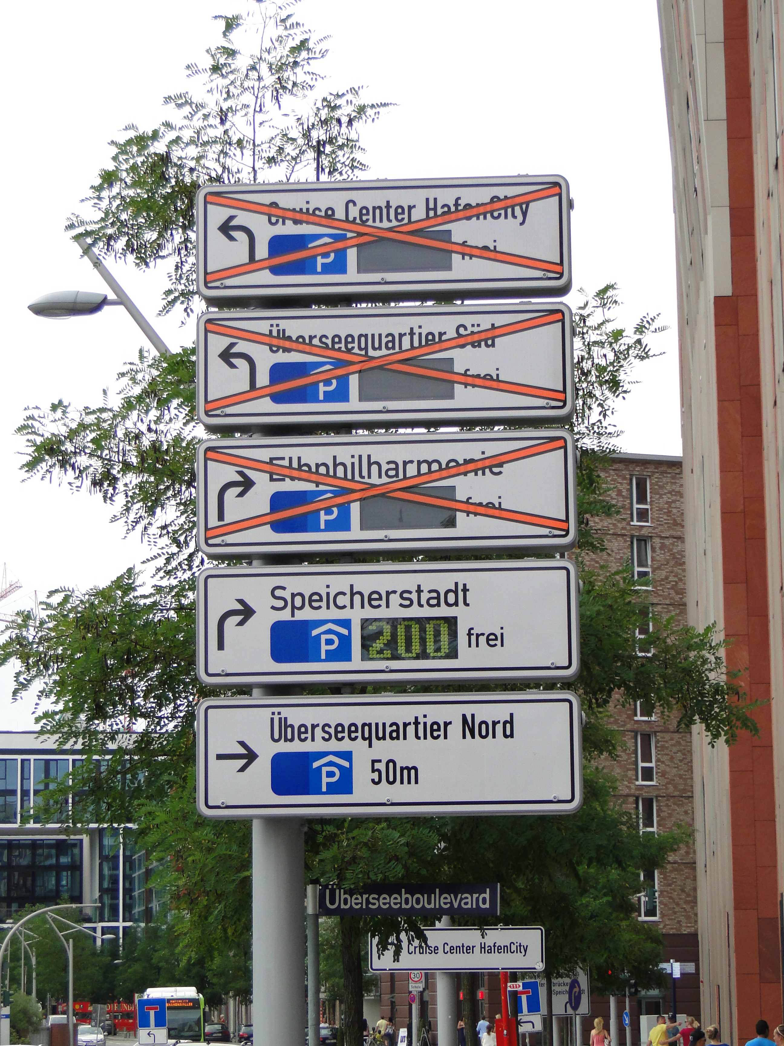 Verkehrsleitsystem der geplanten Parkhäuser in der Hamburg HafenCity. Schild auf der Überseeallee.